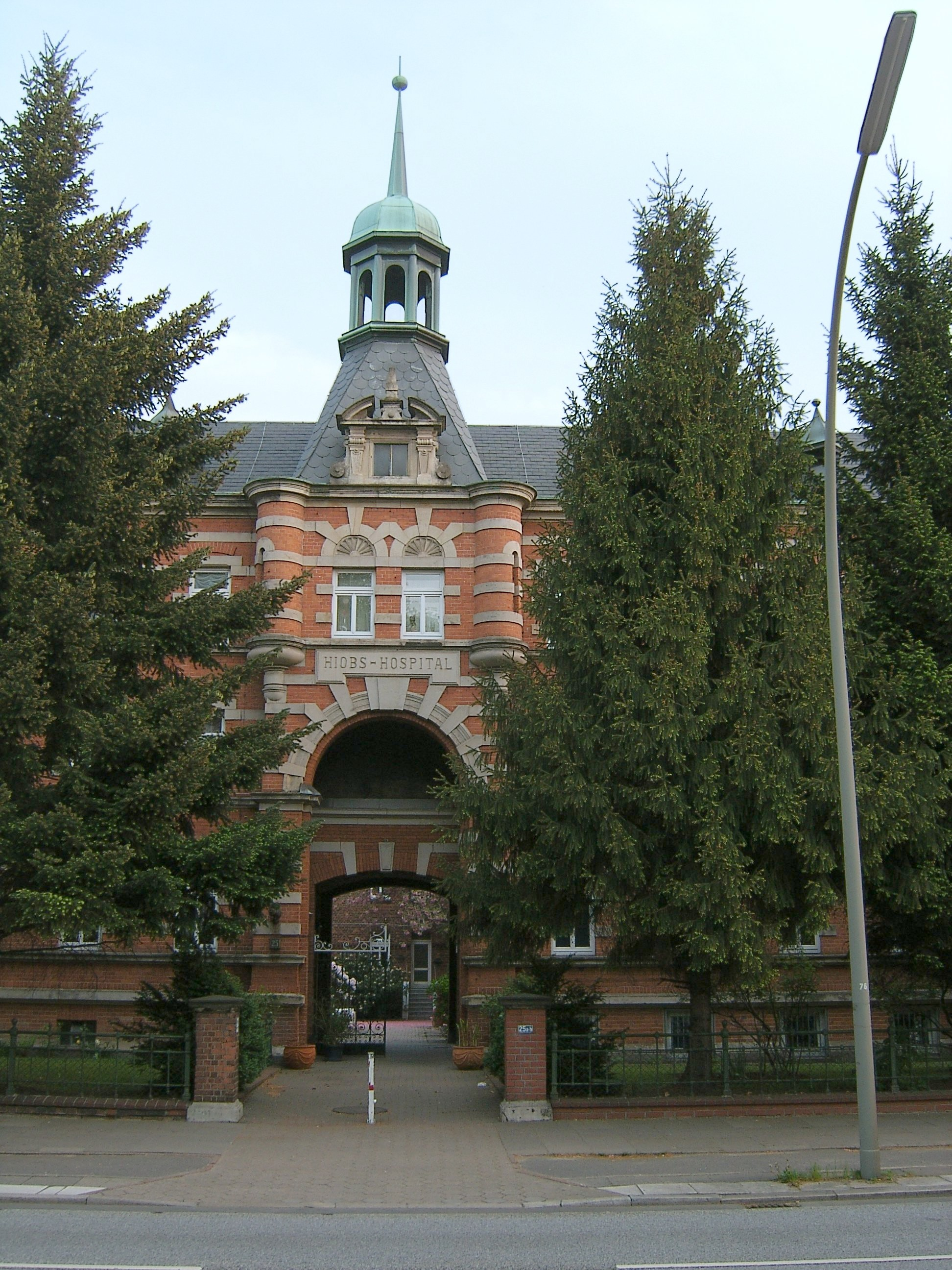 Das Hiobs-Hospital in der Bürgerweide 25 in Borgfelde wurde 1883/84 nach Plänen von Manfred Semper & Carl Philipp Friedrich Krutisch als Wohnstift erbaut. This is a photograph of an architectural monument.